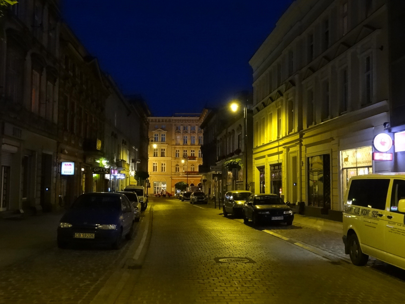 Ulica Dworcowa w Bydgoszczy